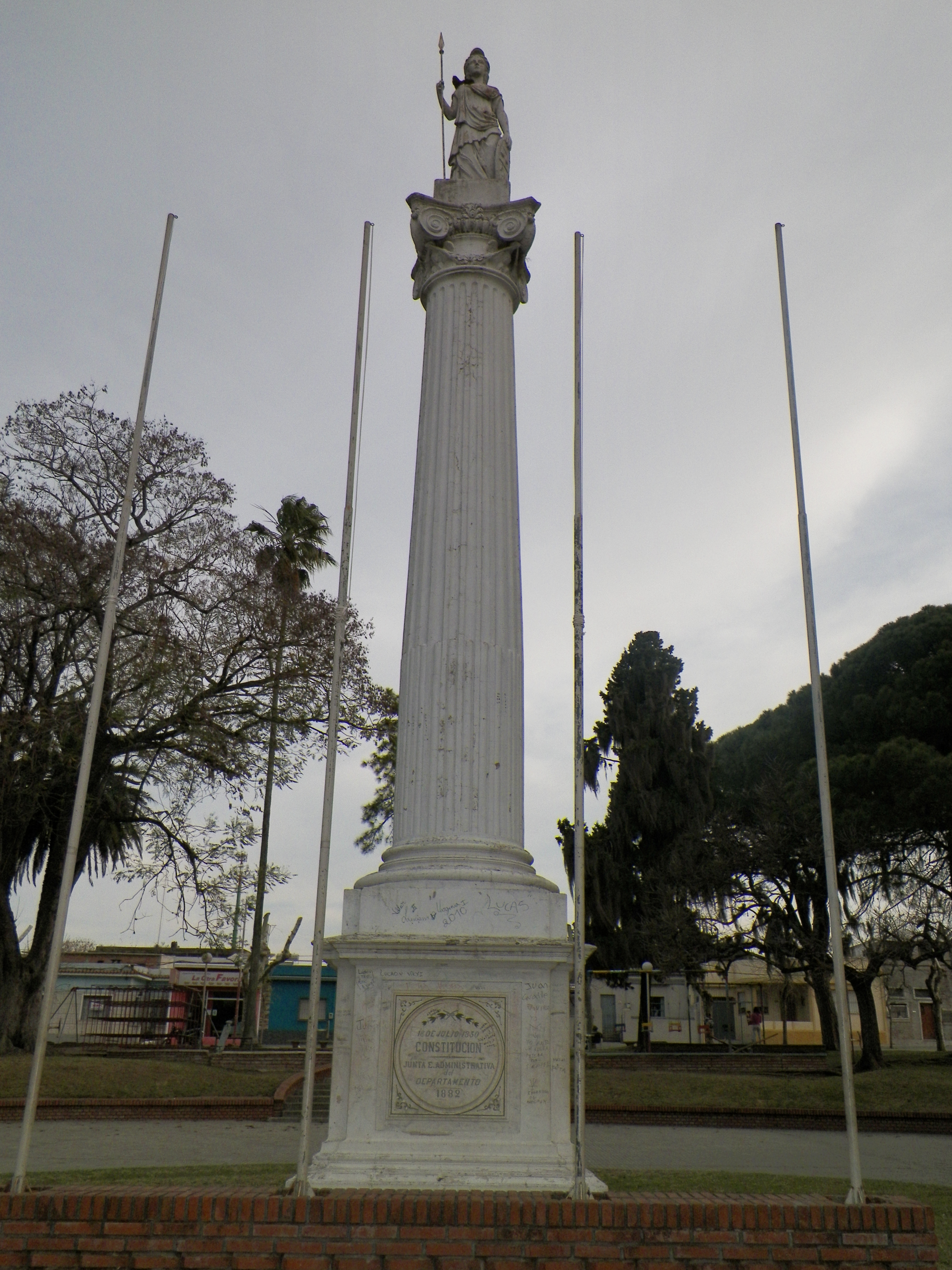 Columna de la Libertad. Ubicada en el departamento de Soriano